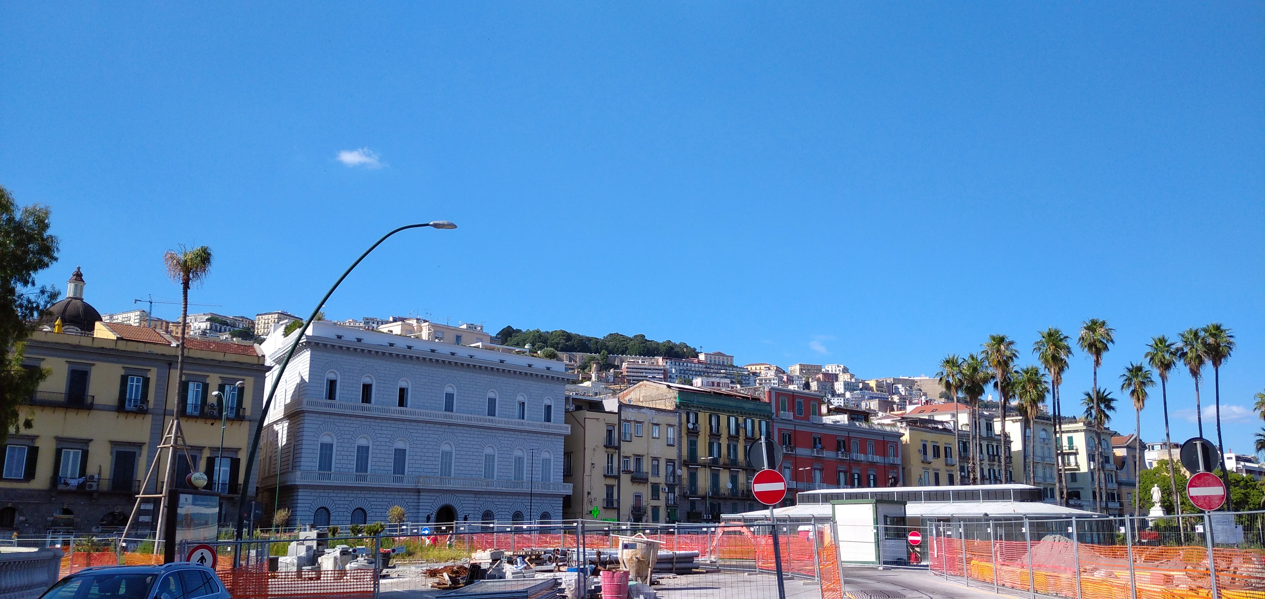 Piazza della Repubblica